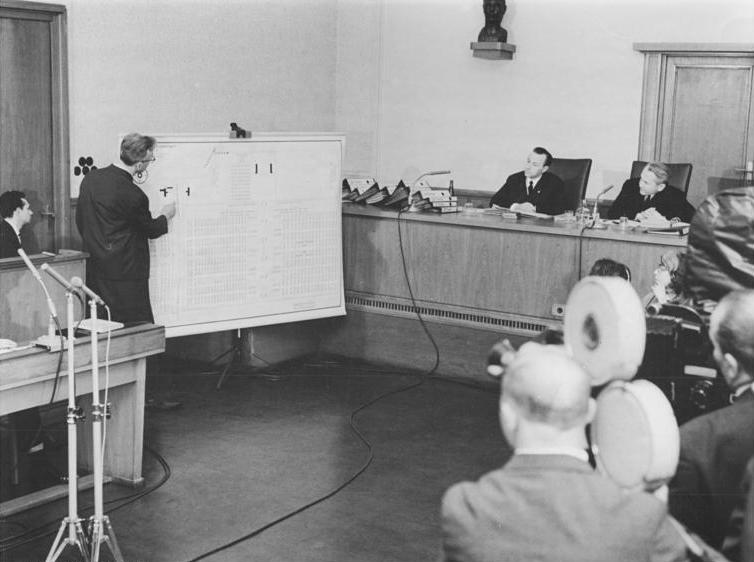 Oberstes Gericht, Fischer-Prozess, Aussage, Fischer Zentralbild Kohls-11.3.1966-Berlin: Prozeß gegen KZ-Arzt Dr. Fischer. 2. Verhandlungstag - 11.3.1966: Vor dem Obersten Gericht der DDR wurde der Angeklagte Fischer zur Sache vernommen. Er wird beschuldigt, als SS-Lagerarzt und Stellvertreter des SS-Standortarztes des Konzentrationslagers Auschwitz-Birkenau in der Zeit von 1942 bis Januar 1945 Zehntausende von Häftlingen selektiert und zur Vernichtung durch Zyklon-B-Gase bestimmt zu haben. UBz: Der Angeklagte KZ-Arzt zeigt an einer Tafel die Krematorien des Konzentrationslager Auschwitz-Birkenau. Rechts: der Präsident des Obersten Gerichts der DDR, Dr. Heinrich Toeplitz; links daneben: Oberrichter Fritz Mühlberger.